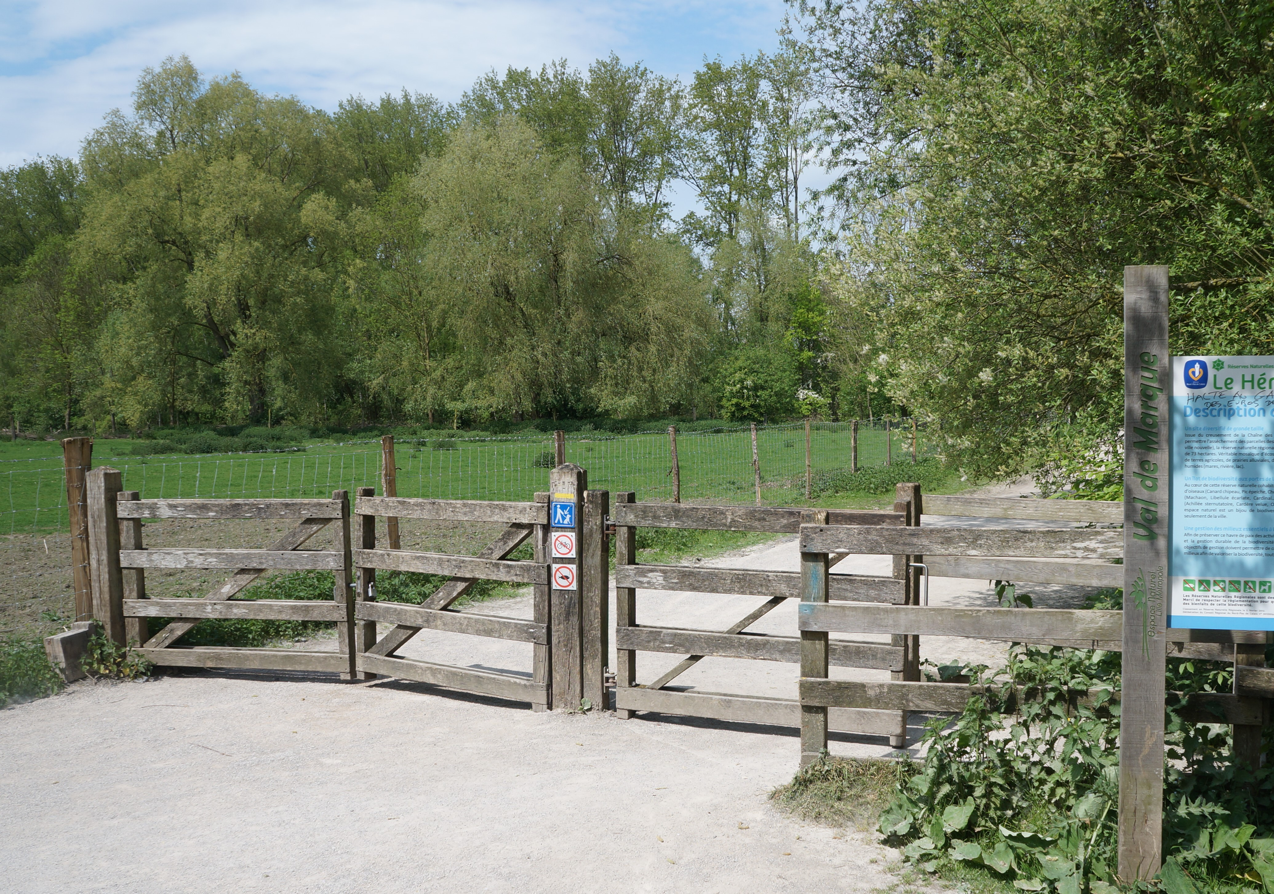 Réserve naturelle régionale du Héron au réserve du Héron par la Rue Colbert.- Parc du Héron à Villeneuve-d'Ascq